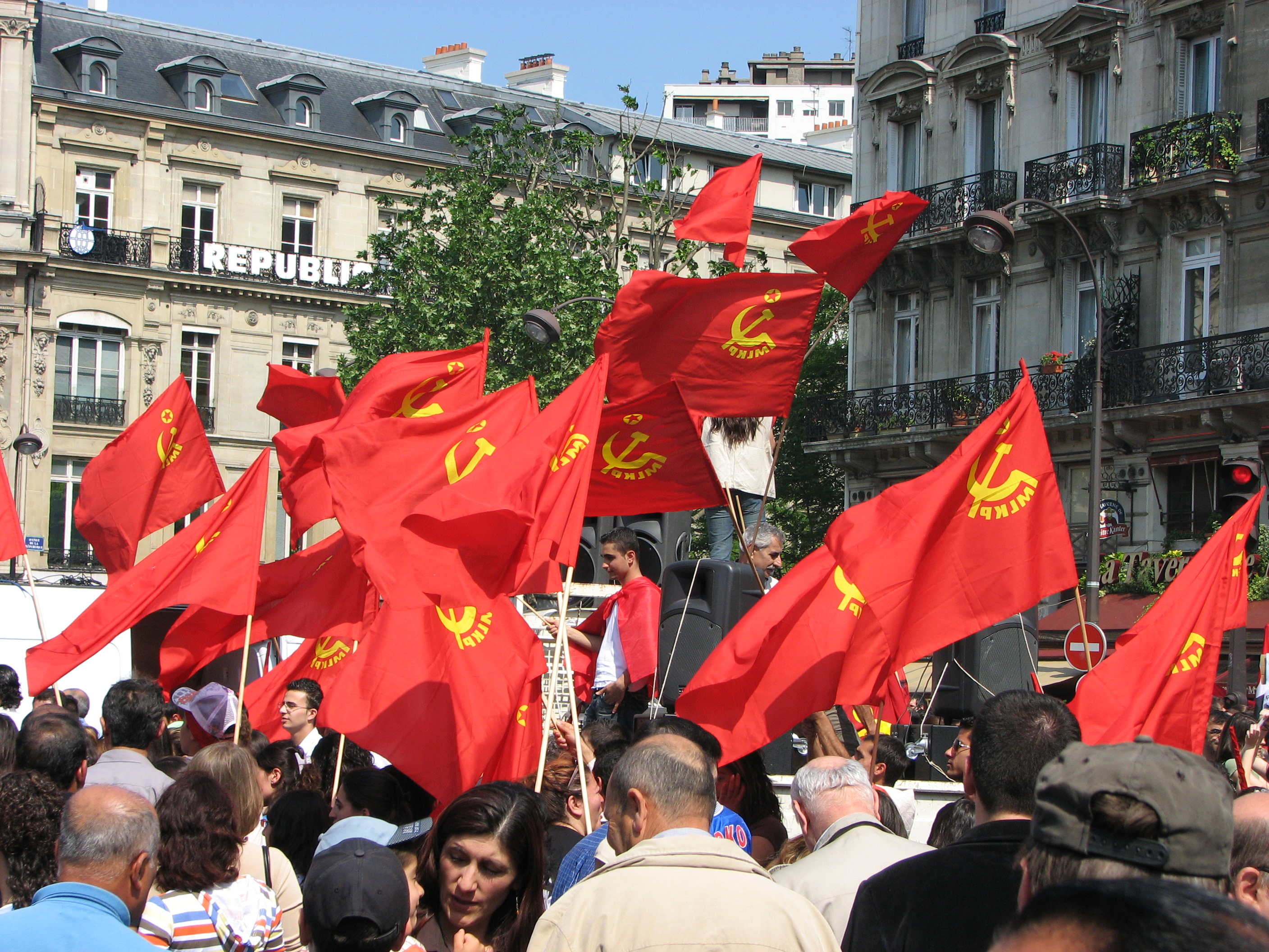 red red red flags